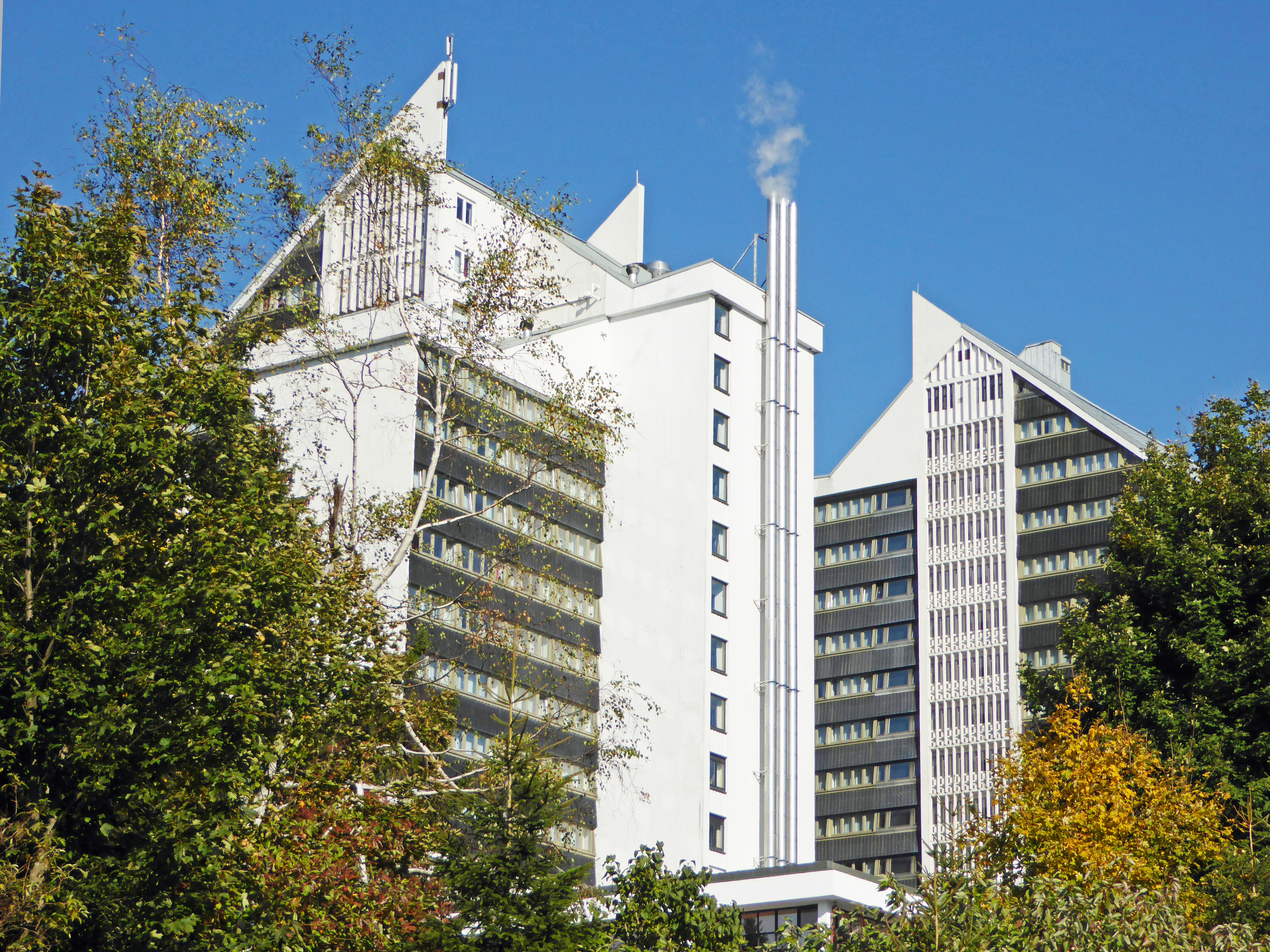 Oberhof Stadt am Rennsteig und Umgebung